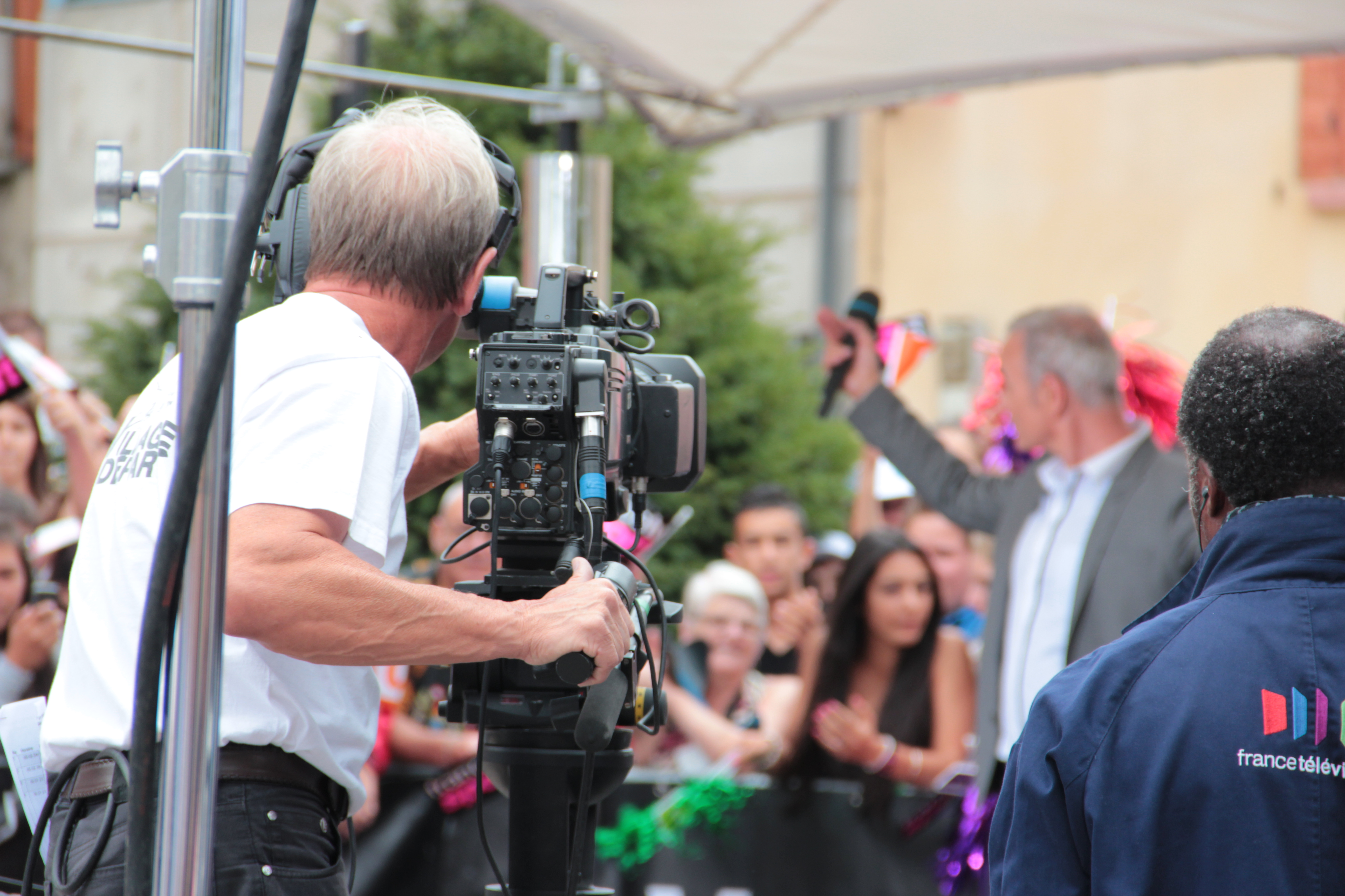 Caméraman filmant Jean-Pierre Mader lors de l'émission "Village départ" enregistrée à Blagnac le 20 juillet 2012 à l'occasion de la 18e étape du Tour de France.